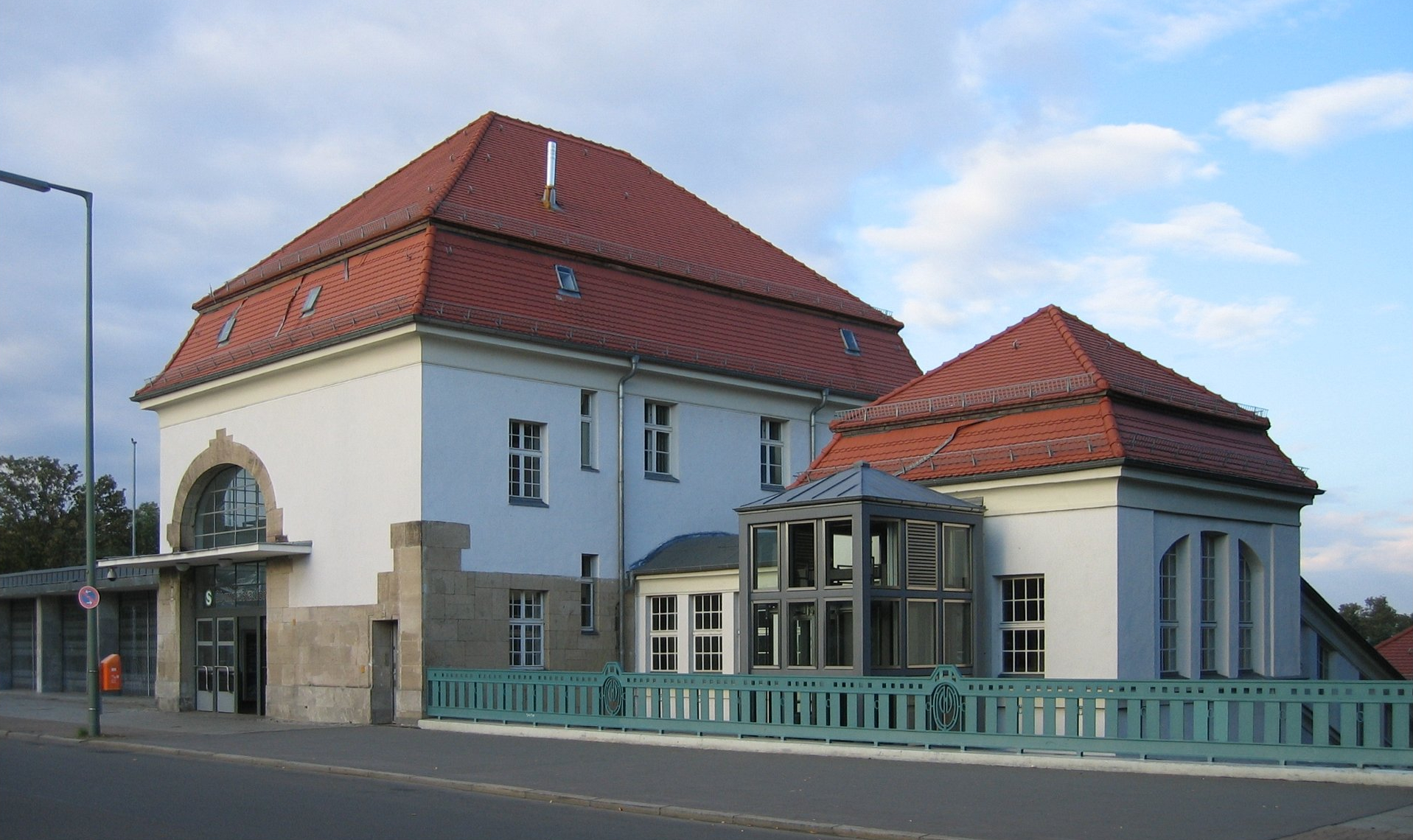 Flatowallee / S-Bahnhof Olympiastadion, Berlin